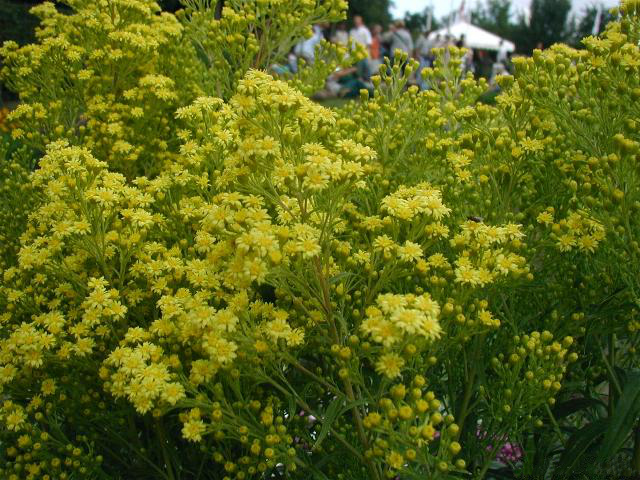 Solidago hybrida